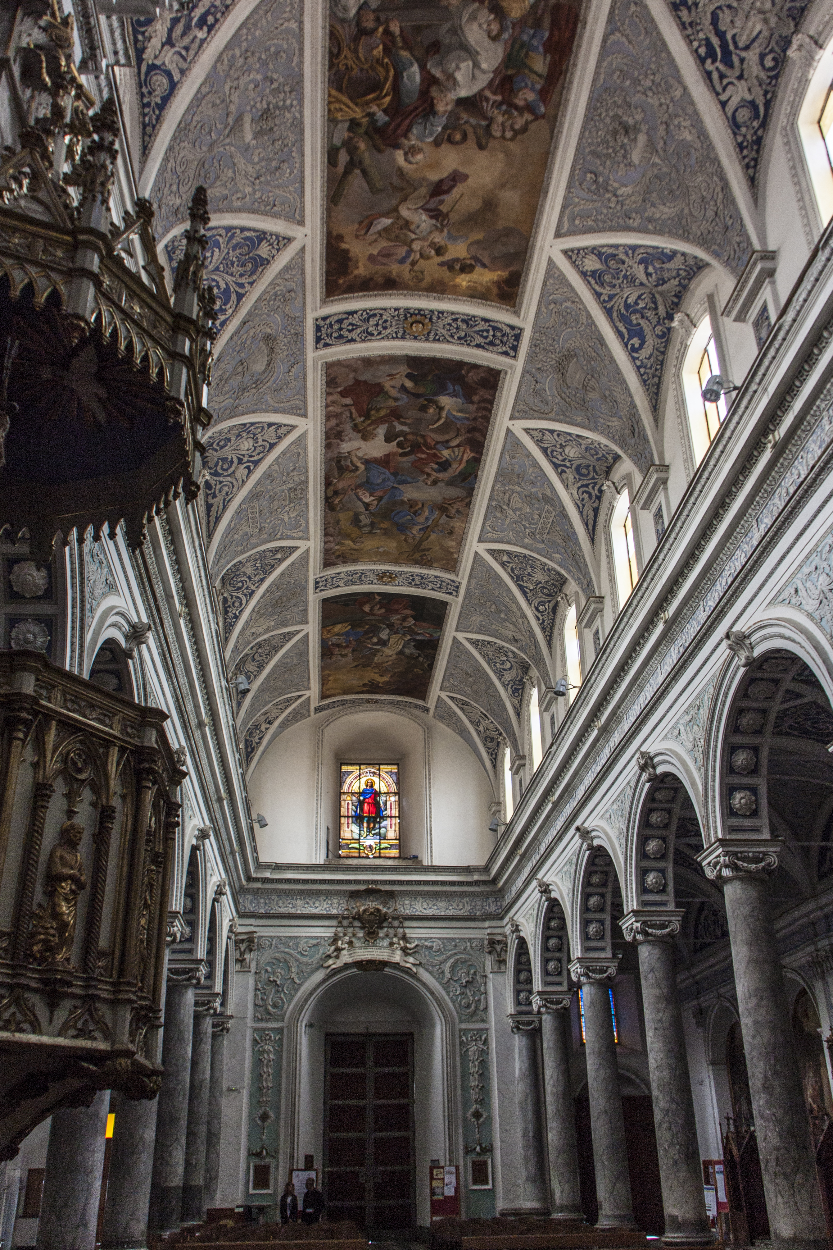 Santa Maria la Cava e Sant'Alfio (Lentini)